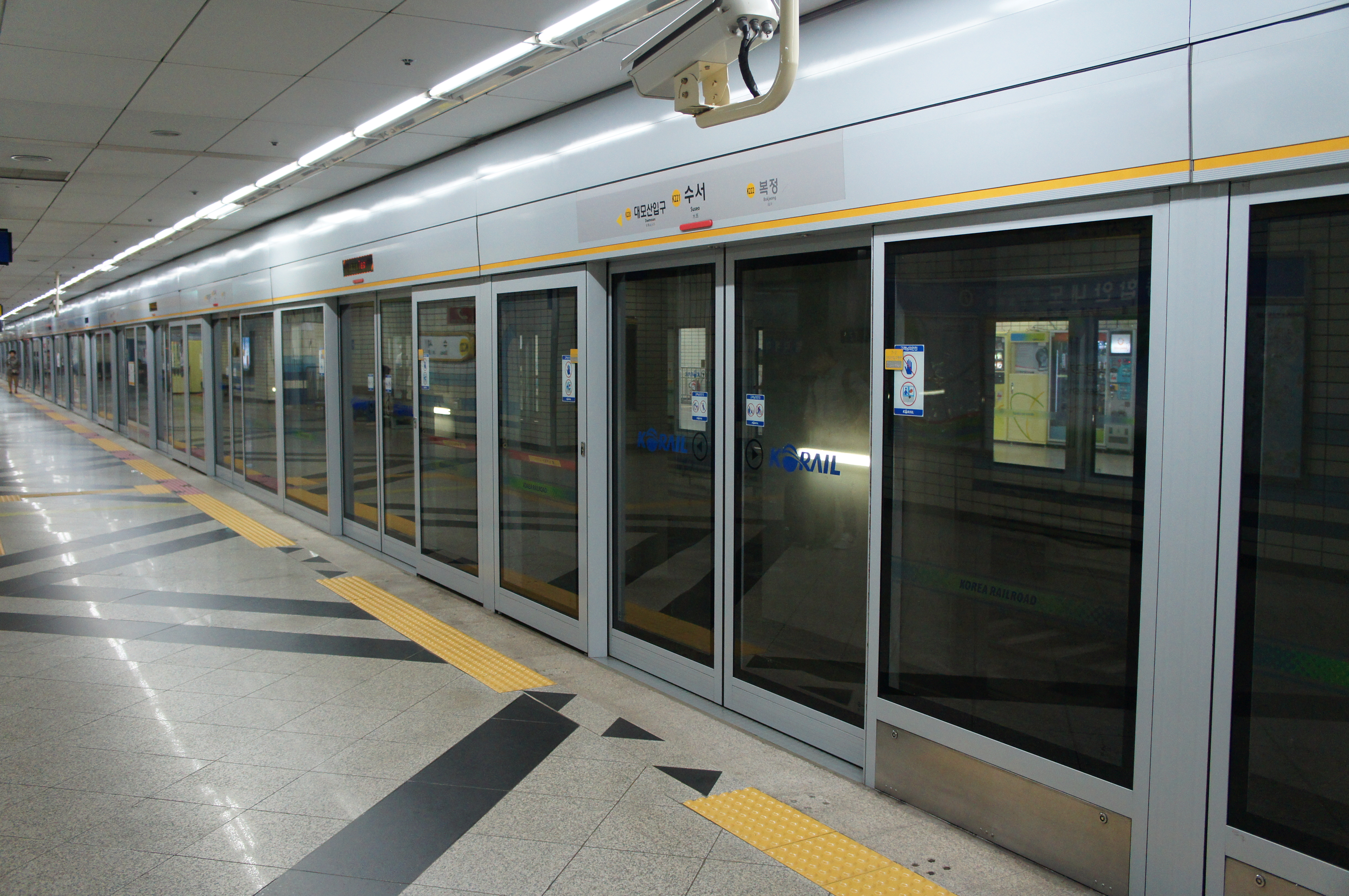 분당선 수서역 승강장